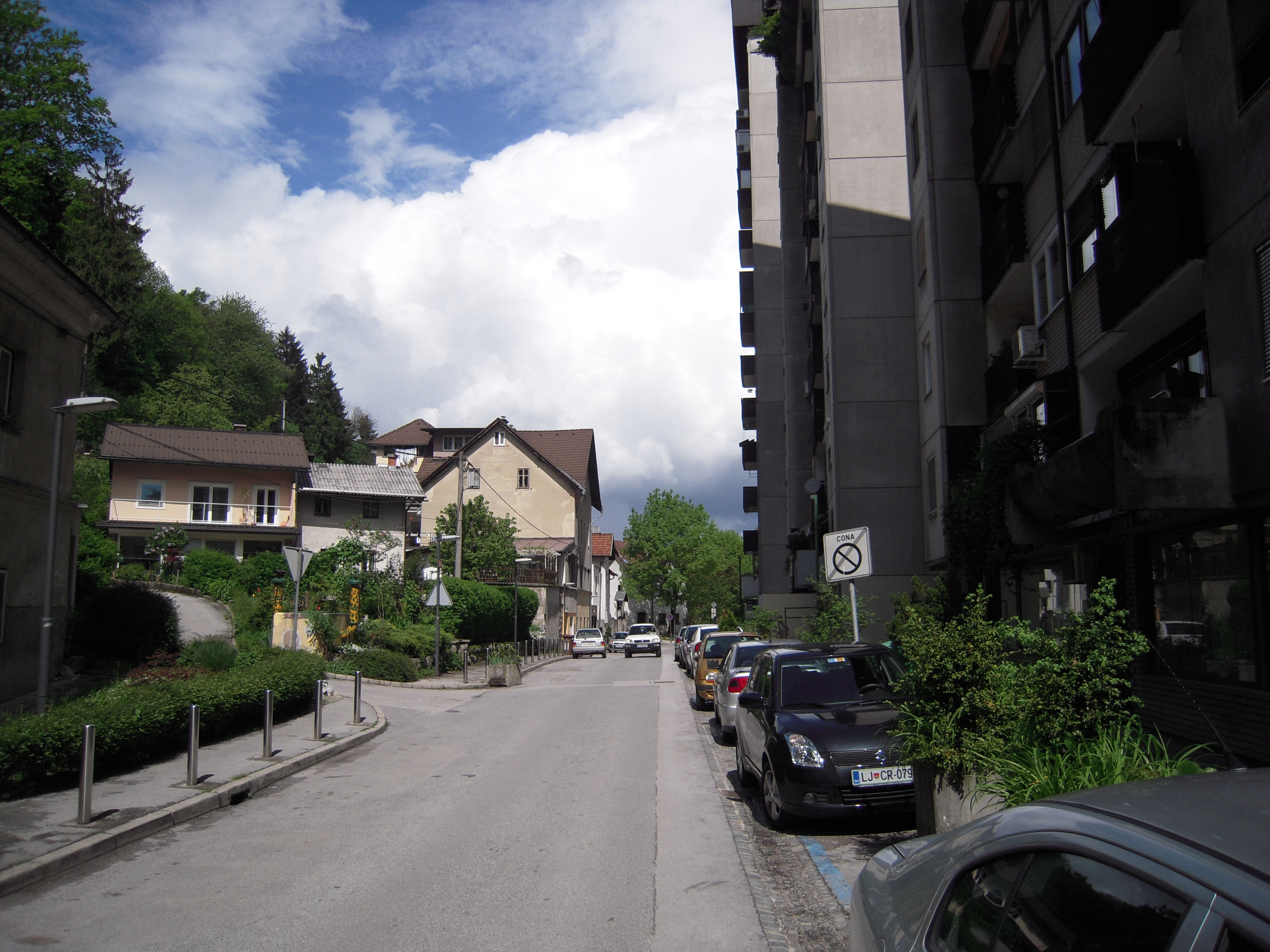 Vodnikova cesta